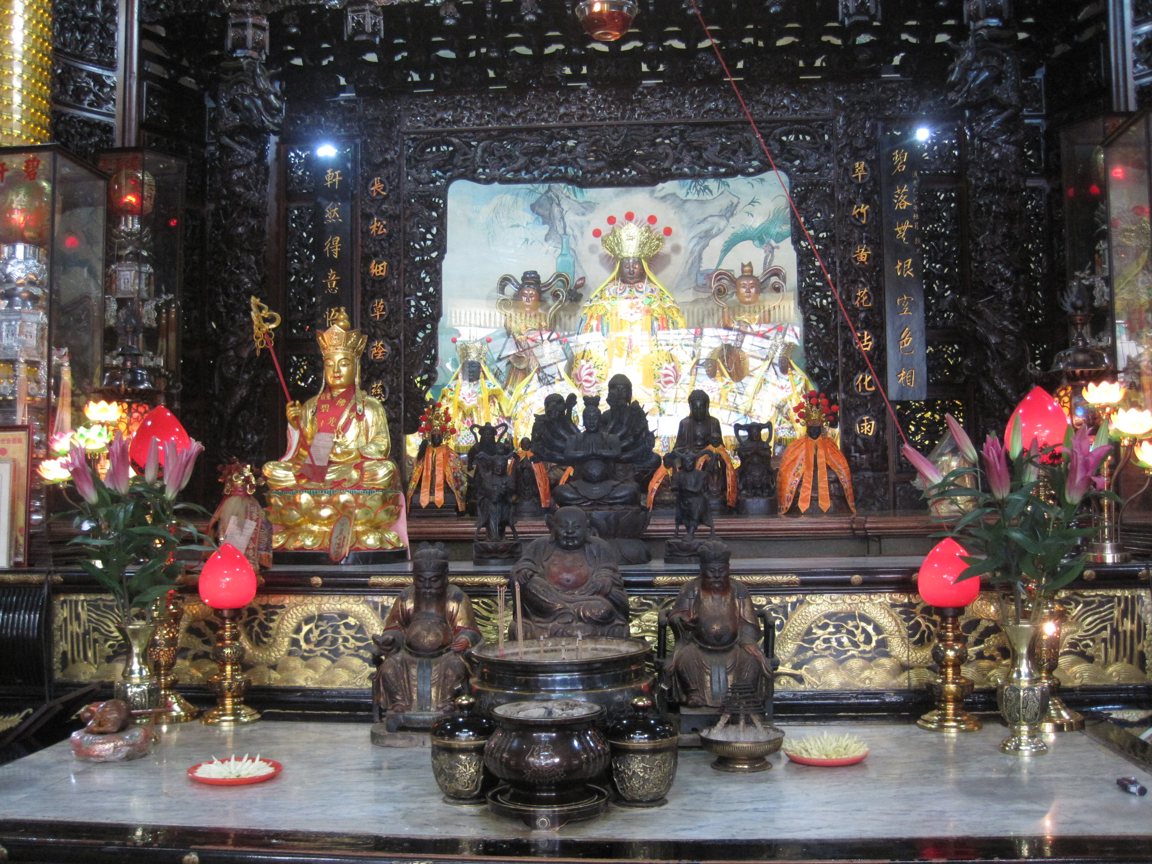 東山碧軒寺供奉的神祇